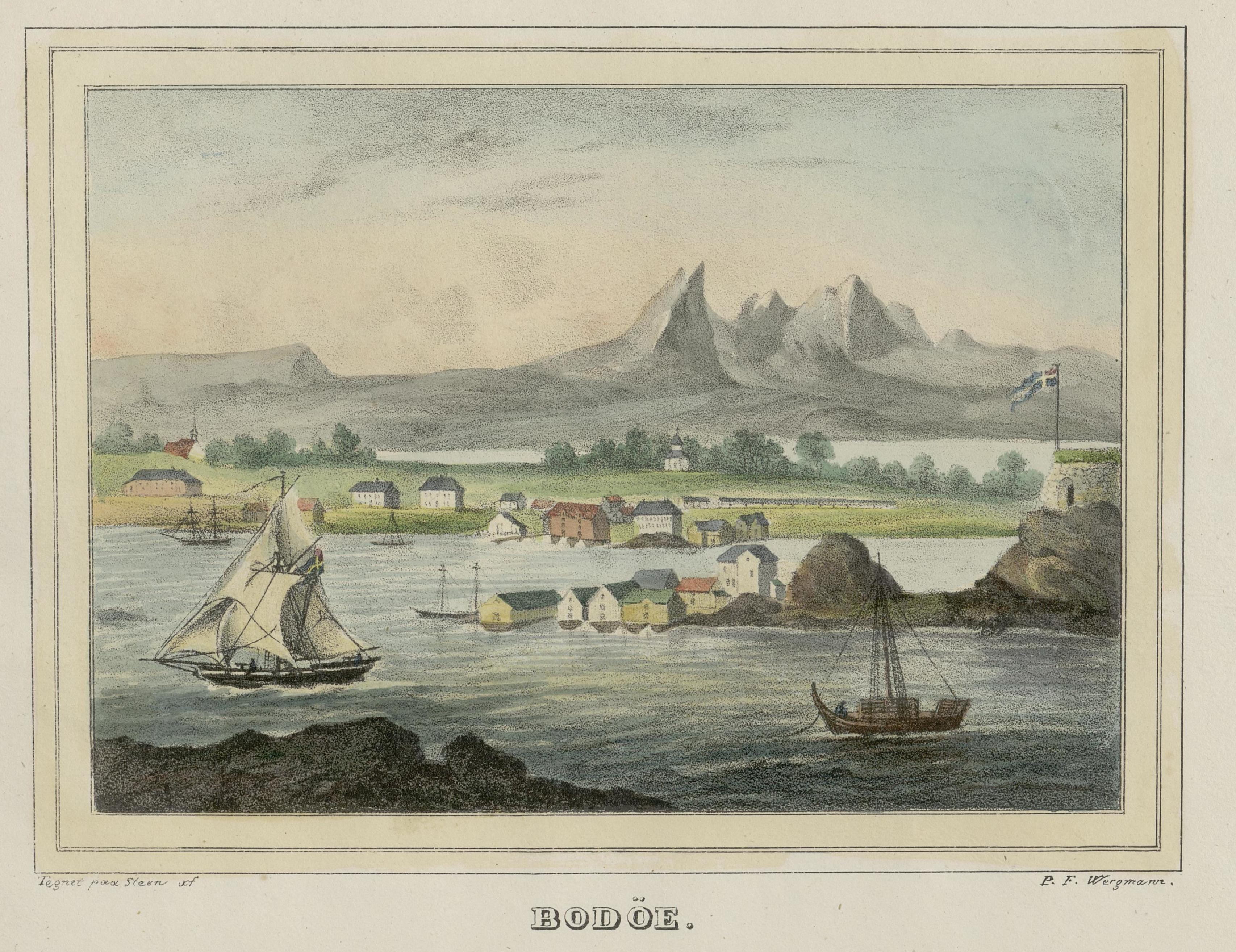 Illustrasjon hentet fra boken "Norsk Prospect-Samling" av Wergmann, P.F. og utgitt av P.F. Wergmann (no, 1833-1836)